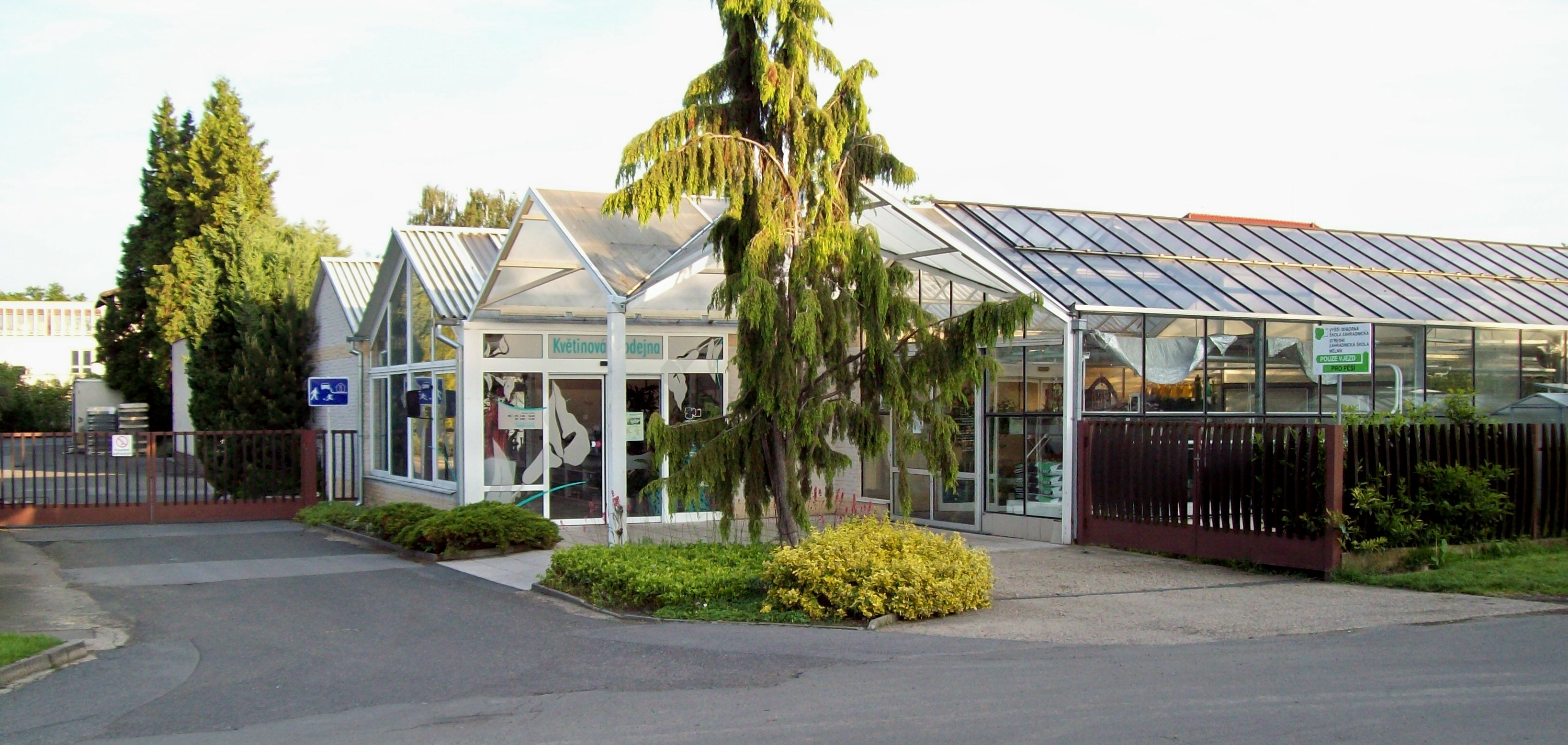 Vjezd a vstupní brána do Vyšší odborné školy zahradnické a Střední zahradnické školy v Mělníku.